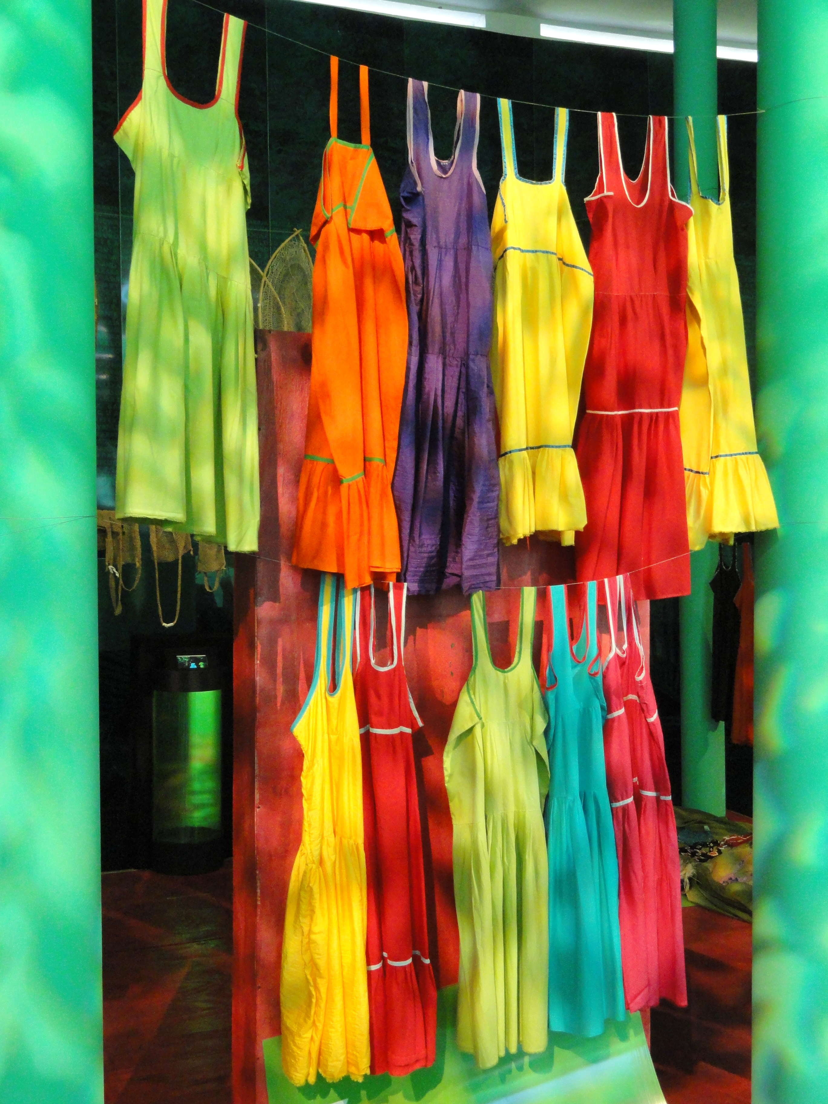 Exhibit in the Memorial dos Povos Indígenas, Brasília, Brazil.